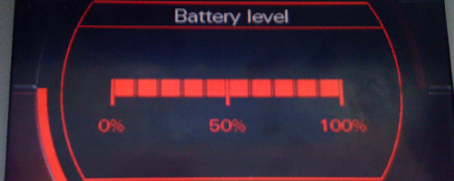 Audi MMI 2G poziom akumulatora